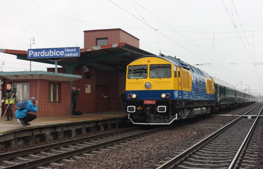 26.10.2016, Pardubice hlavní nádraží 759.002-9 v čele Ex 10005 „Retro Ostravan“. V letech 1975 a 1976 se cestující na pardubickém hlavním nádraží mohli příležitostně setkat s prototypem lokomotivy T 499.0002 „Kyklop“, která na expresu 104/105 „Ostravan“ jezdila do Bohumína a zpátky. Právě tato lokomotiva se na nádraží objevila také po čtyřiceti letech v roce 2016.